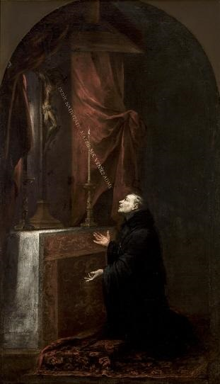 El lienzo representa a Santo Tomás de Villanueva (1486-1555), que fue arzobispo de Valencia y aparece arrodillado y rezando ante un crucifijo.